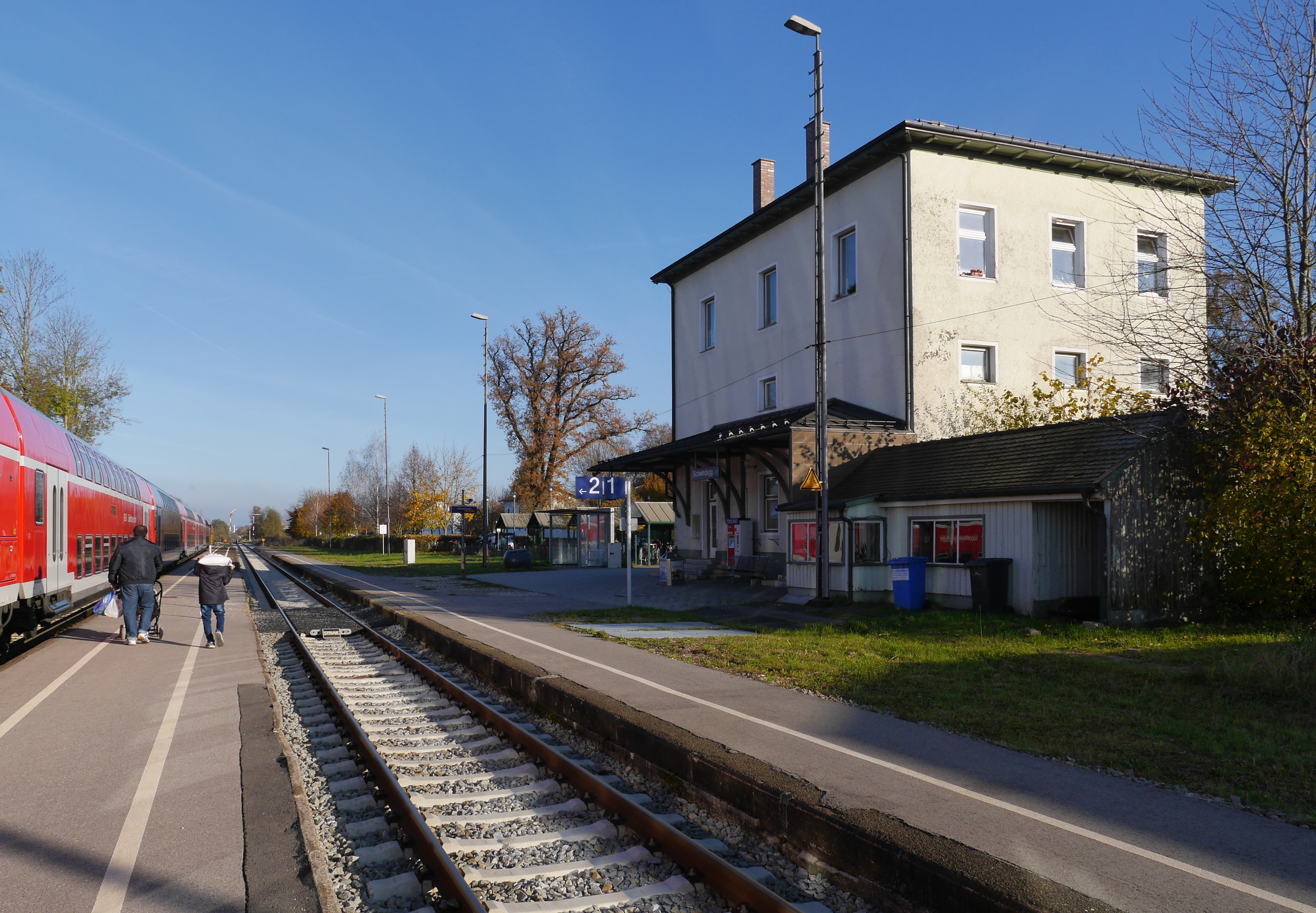 Bahnsteige des Bahnhofs Schwindegg, rechts das Empfangsgebäude mit Stellwerksvorbau, links die aus Doppelstockwagen gebildete RB 27045 von München nach Mühldorf